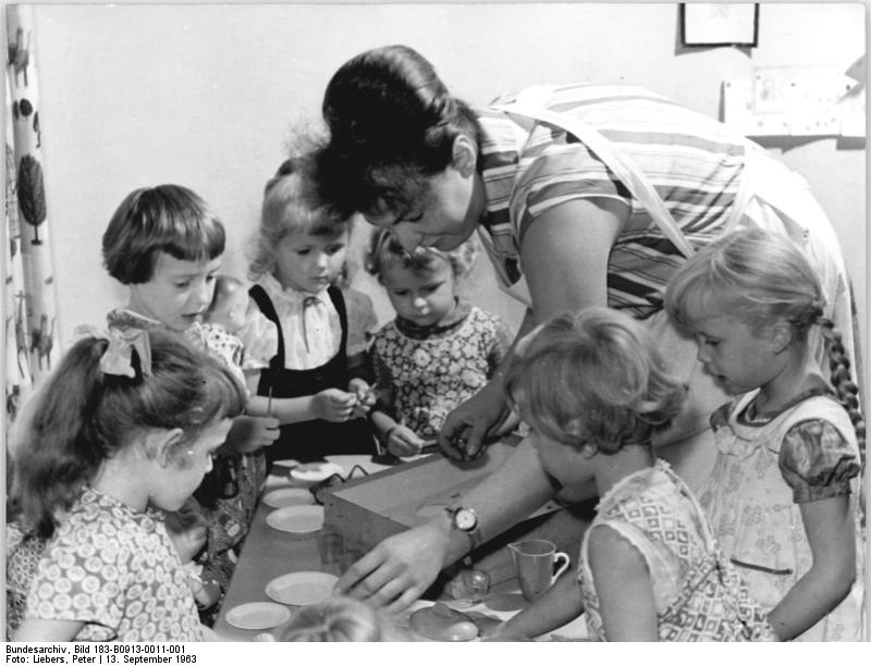 Kauern, Blick in den Kindergarten Zentralbild Liebers 13.9.1963 In guten Händen sind die Kinder....des Dorfes Kauern im Landkreis Gera bei Käte Praetzel. Vier Erzieherinnen sorgen in dem im vergangenen Jahr fertiggestellten Kindergarten für die Kleinen während die Eltern in der LPG oder MTS ihrer Arbeit nachgehen.